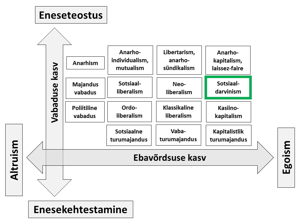 Sotsiaaldarvinism sotsiaalse korra mudelis